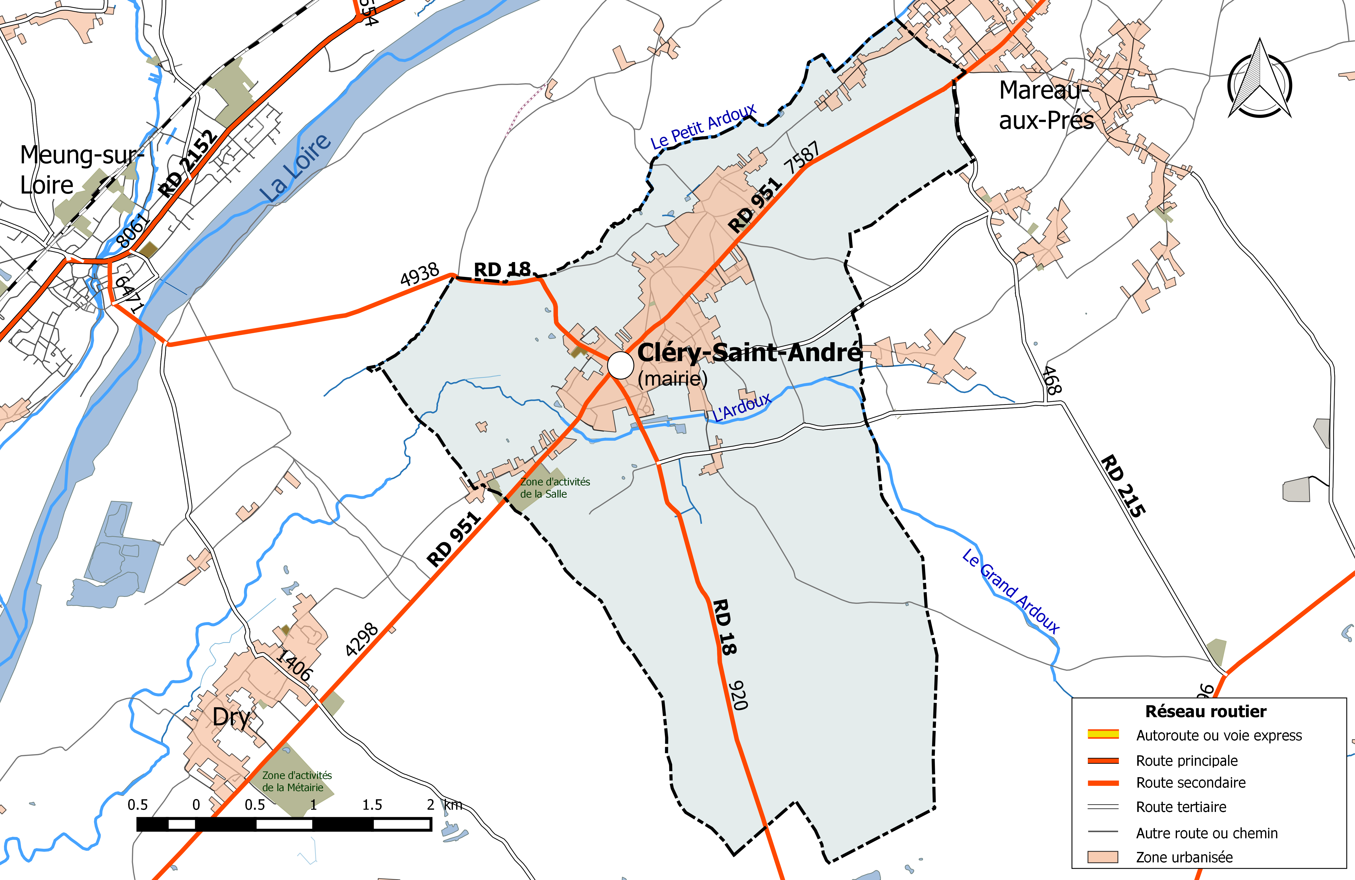 Carte du réseau routier de la commune de Cléry-Saint-André.